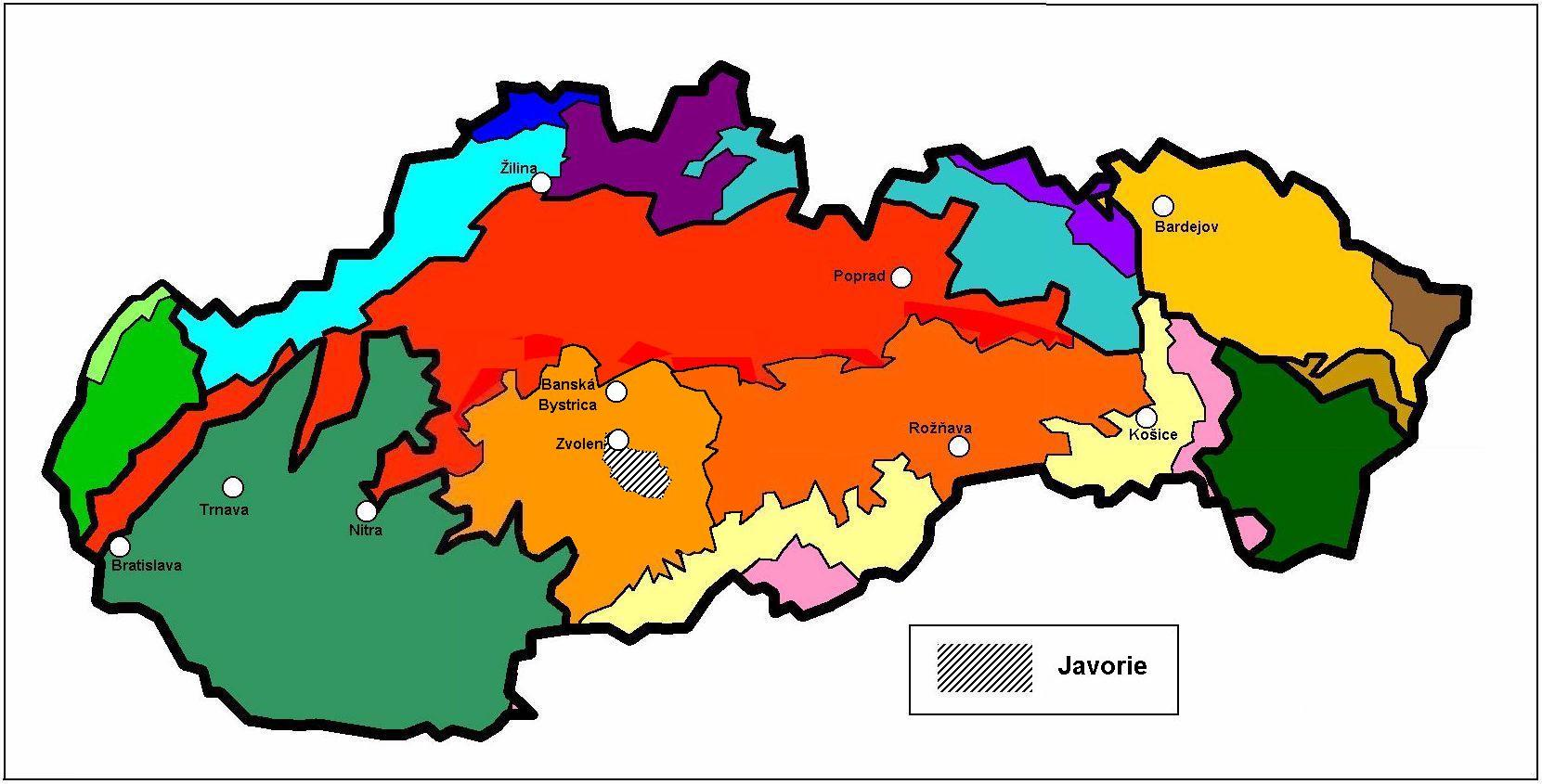 Javorie